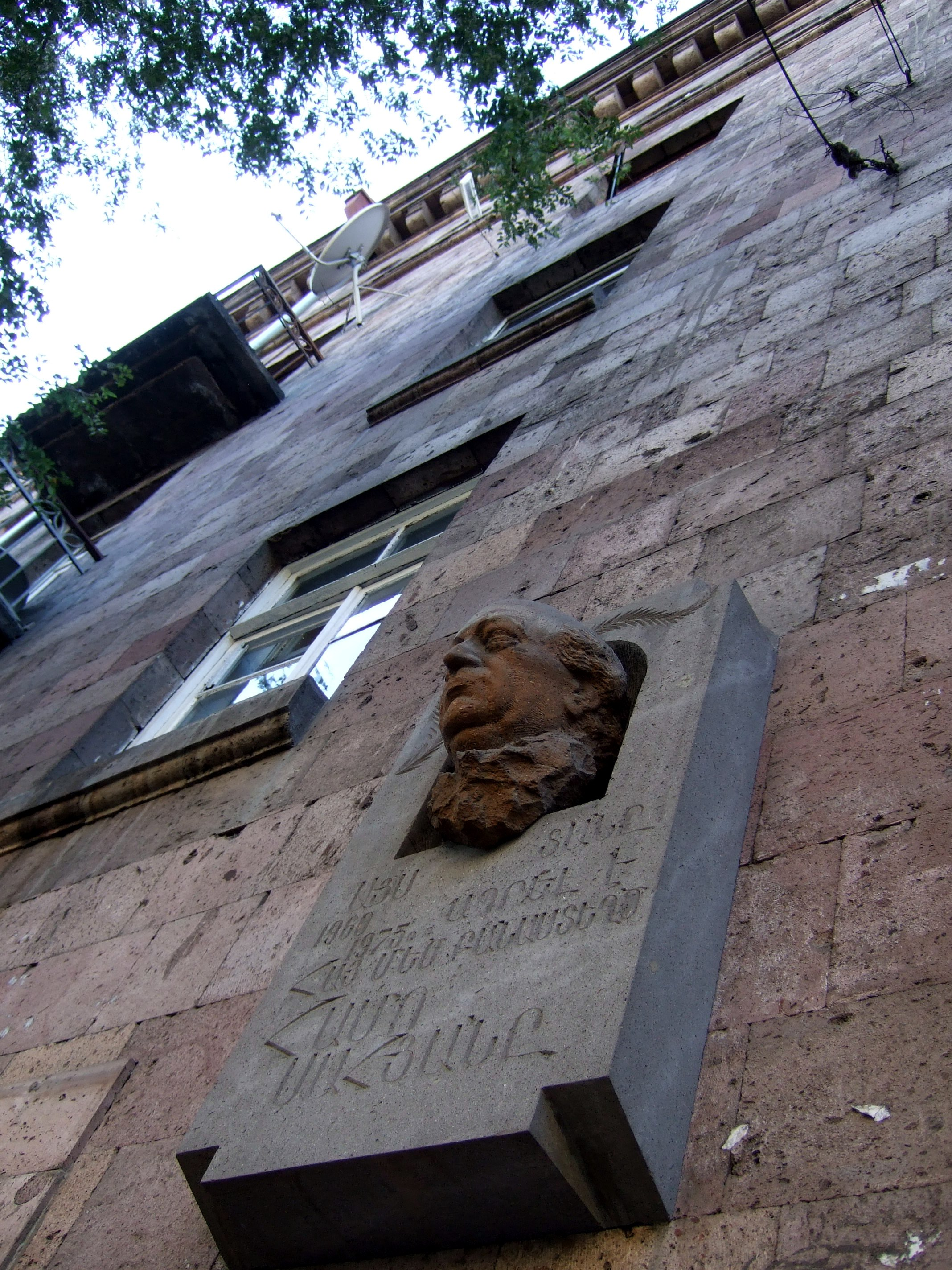 Այս տանը ապրել է հայ մեծ բանաստեղծ Համո Սահյանը